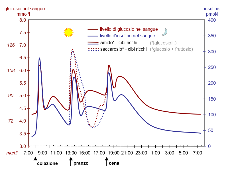 curve idealizzate della concentrazione di glucosio e di insulina nel sangue umano durante il corso di una giornata che contiene tre pasti; l'effetto del pasto ricco di zuccheri è evidenziato.